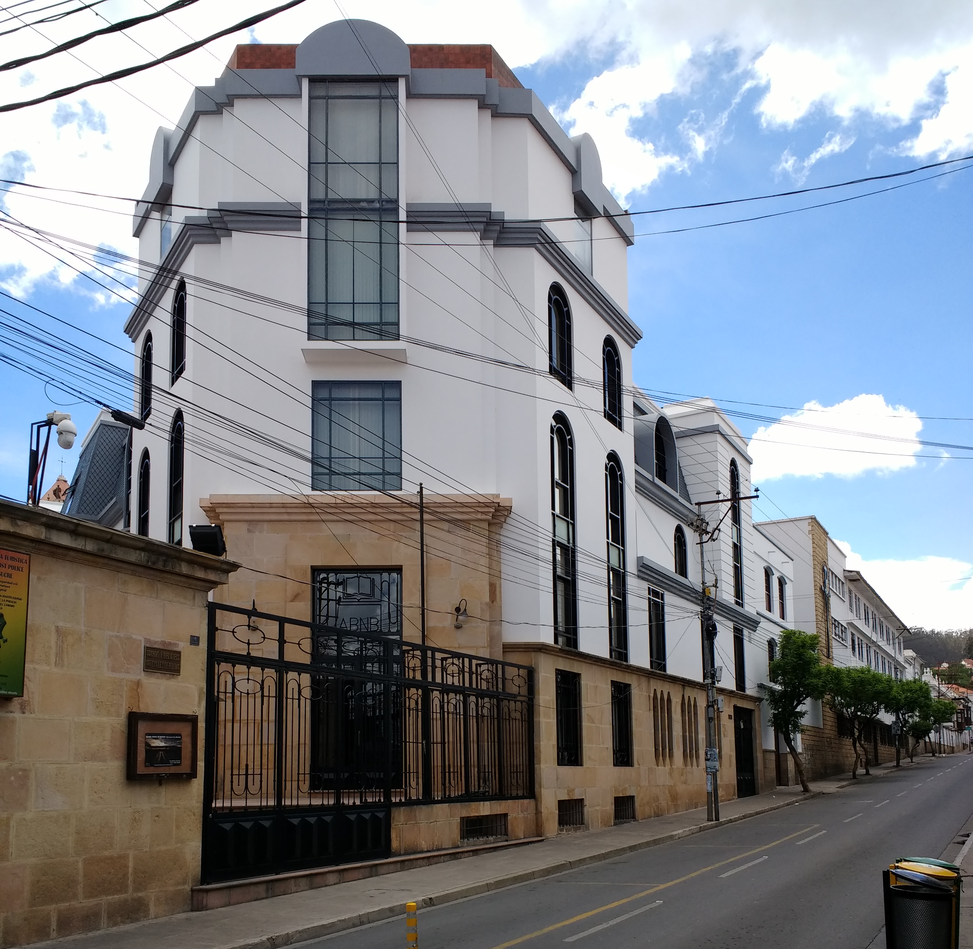 Archivo y Biblioteca Nacionales de Bolivia.